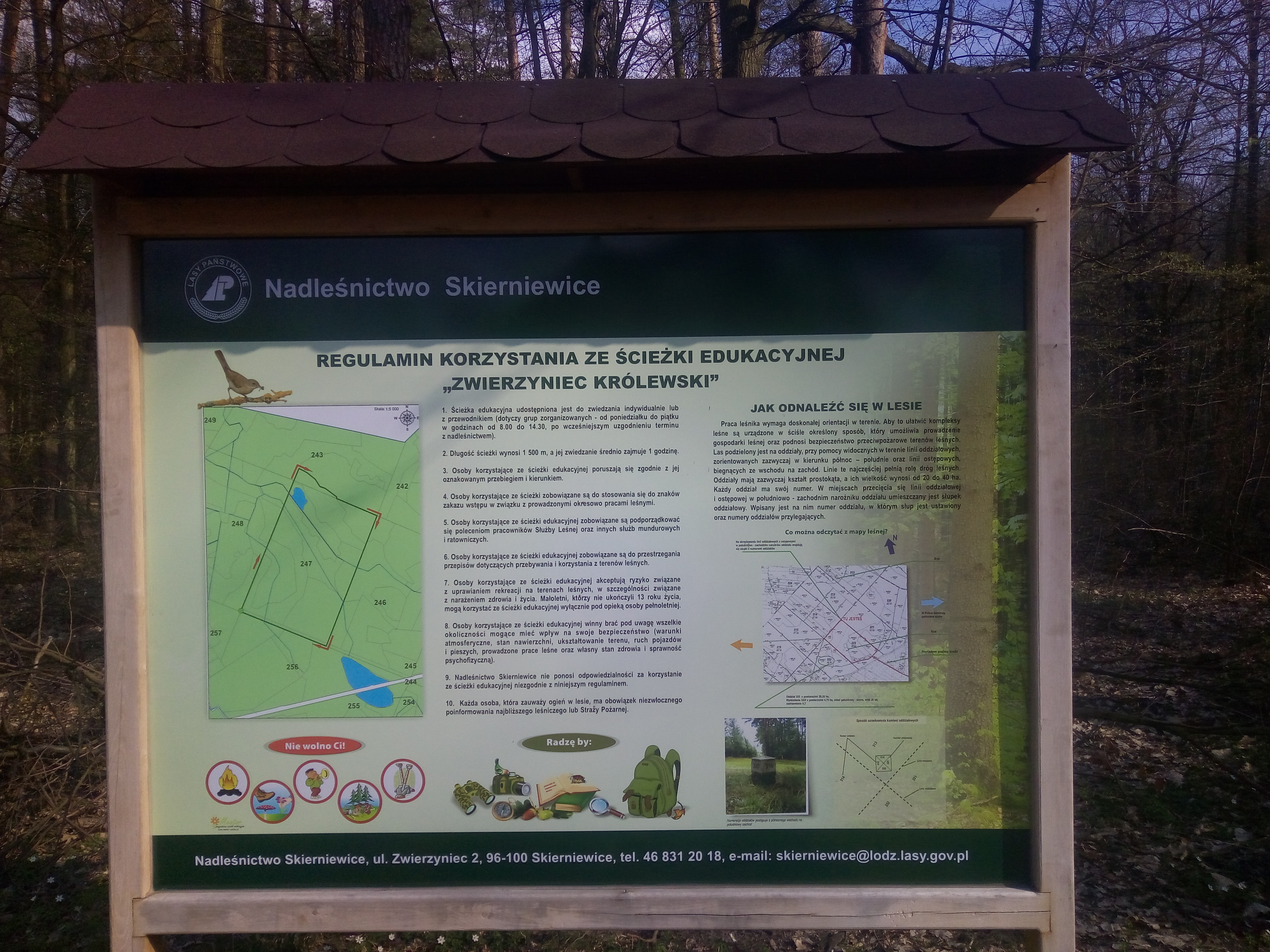 Ścieżka edukacyjna "Zwierzyniec Królewski" w Lesie Zwierzynieckim pod Skierniewicami - tablica informacyjna.